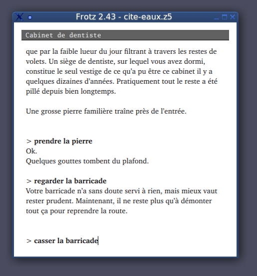 copie d'écran sous Linux KDE du logiciel Frotz, pour un jeu (La cité des eaux) entrant dans le cadre de notre concours de fiction interactive. Le jeu est disponible ici